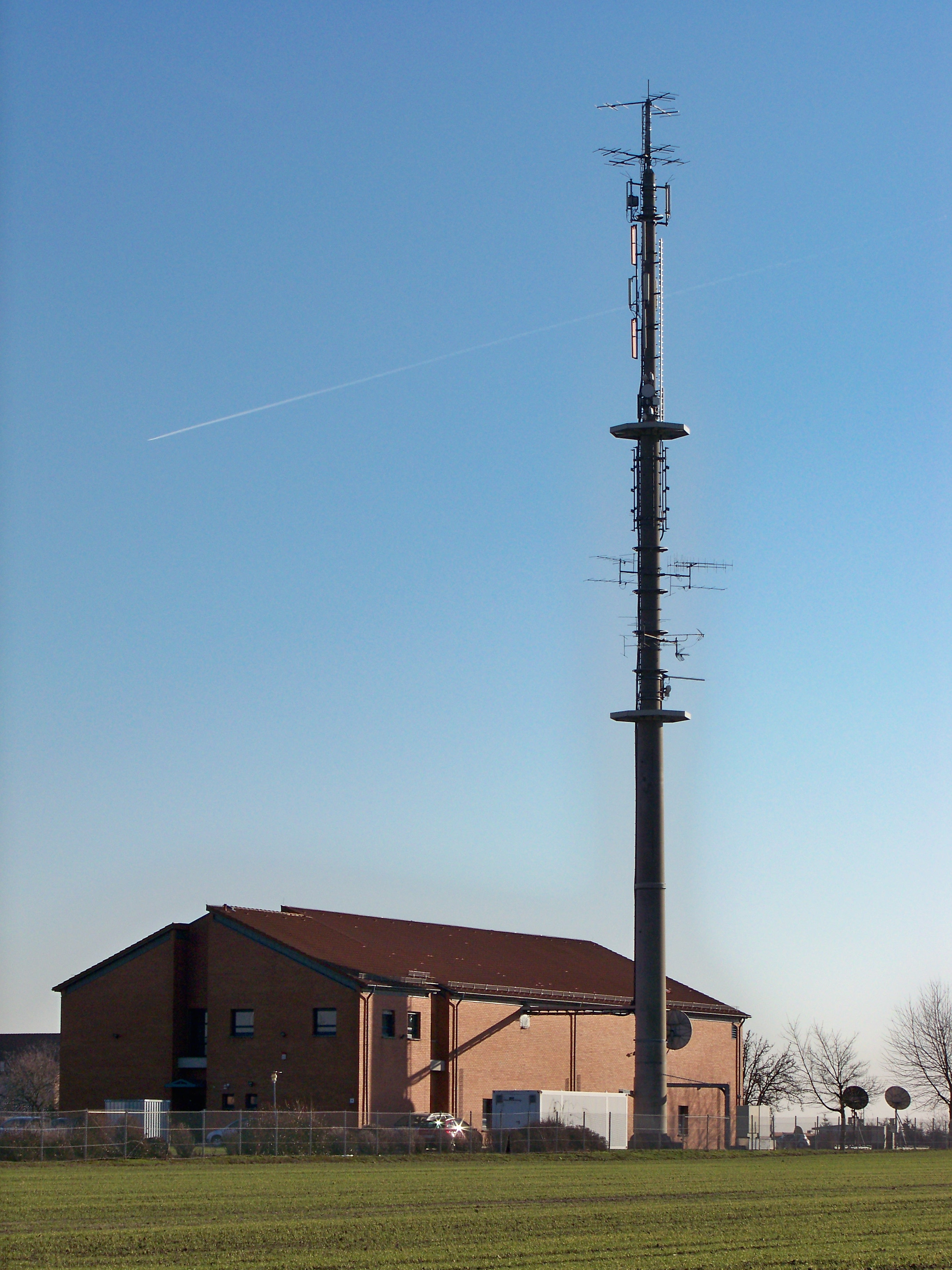 Kopfstation und Fernmeldeturm der Deutschen Telekom am westlichen Rand der Stadt Eilenburg